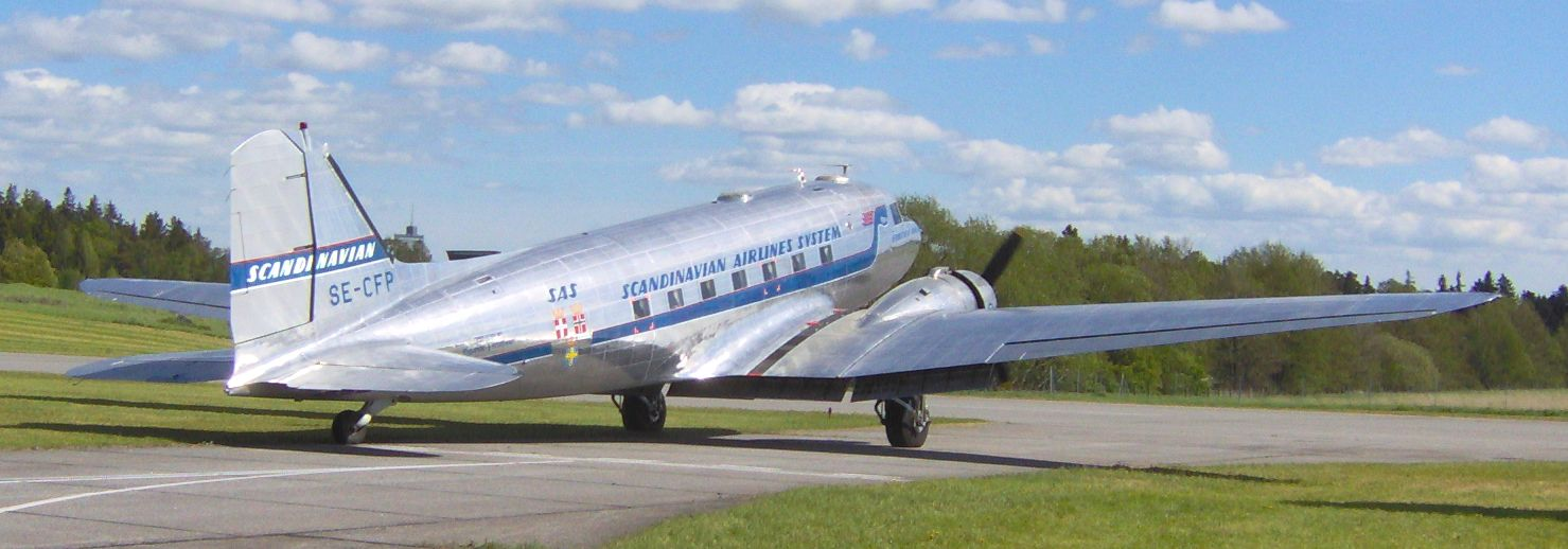 DC 3:an Daisy, veteranflygplanet, taxar ut vid Stockhom-Barkarby flygfält i Storstockholm på Fly-inn dagarna år 2006 DC 3, Daisy a veteranplane, taxis to the runway at Stockholm-Barkarby airfield, Greater Stockholm, Sweden on the fly-inn days of 2006.